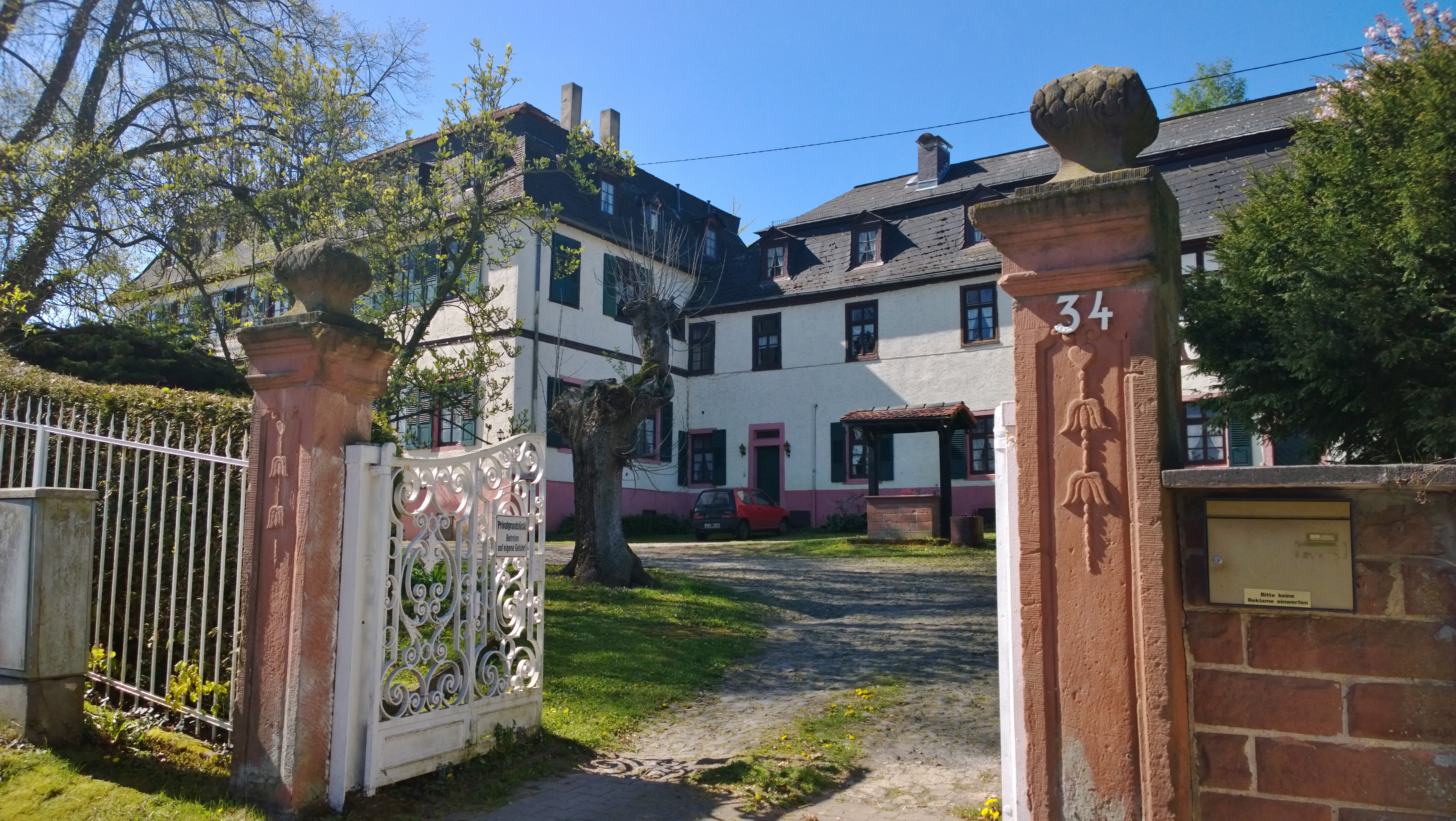 Schloss Günderrode: Blick aufs Schloss